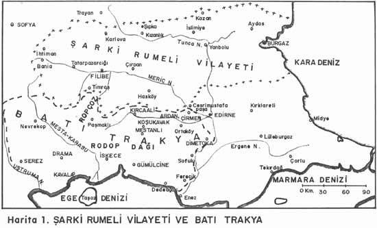 Carte de la République de Gümülcine (1913)